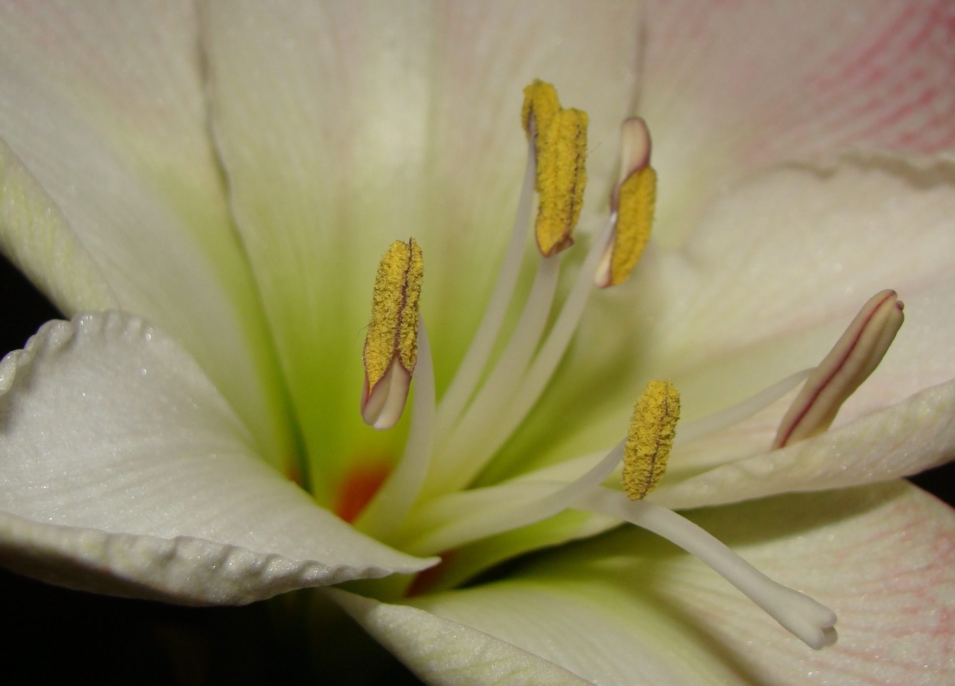 Hippeastrum, Antheren öffnen sich